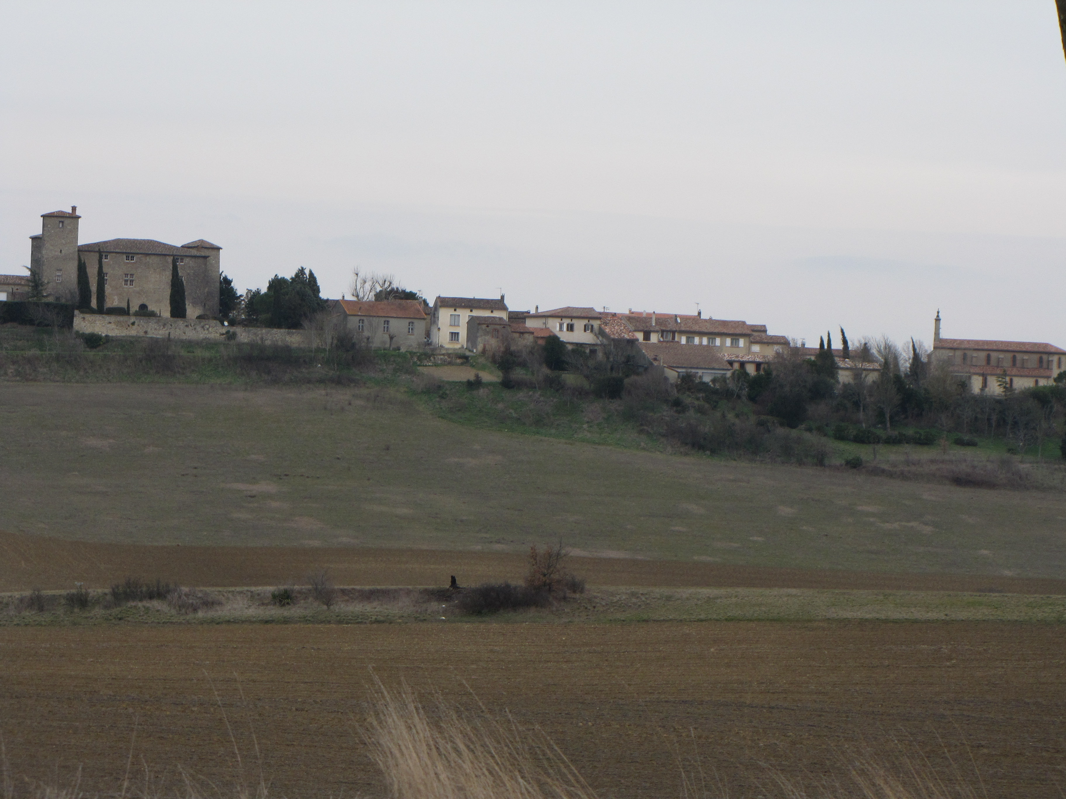 Vue du village de Juzes (Haute-Garonne, France).